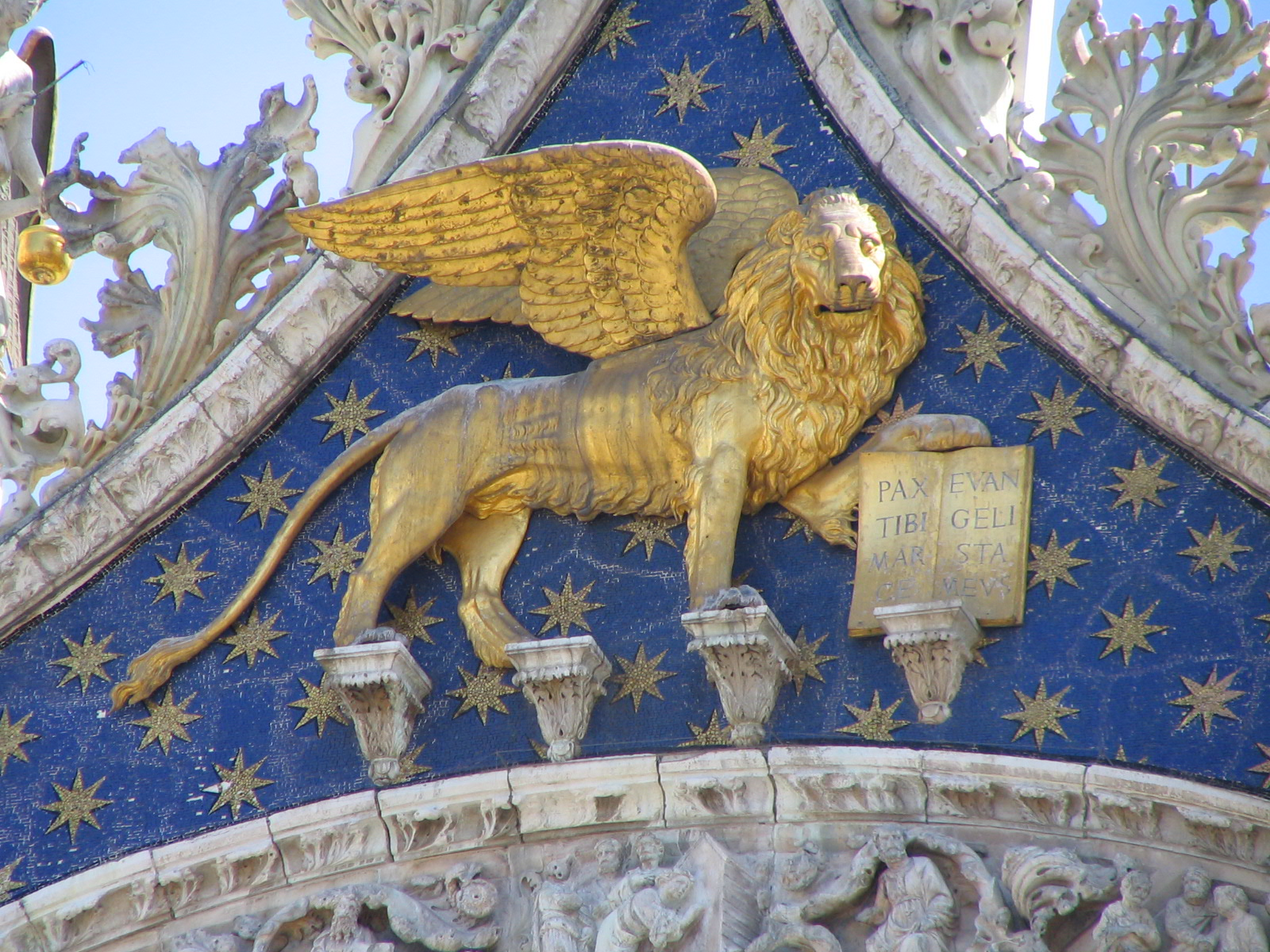 Détails de la Façade de la Basilique Saint Marc à Venise